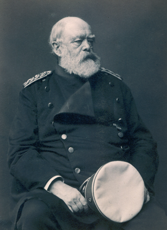 Porträt Otto von Bismarcks, Kniestück, sitzend, Kopf 3/4 nach rechts